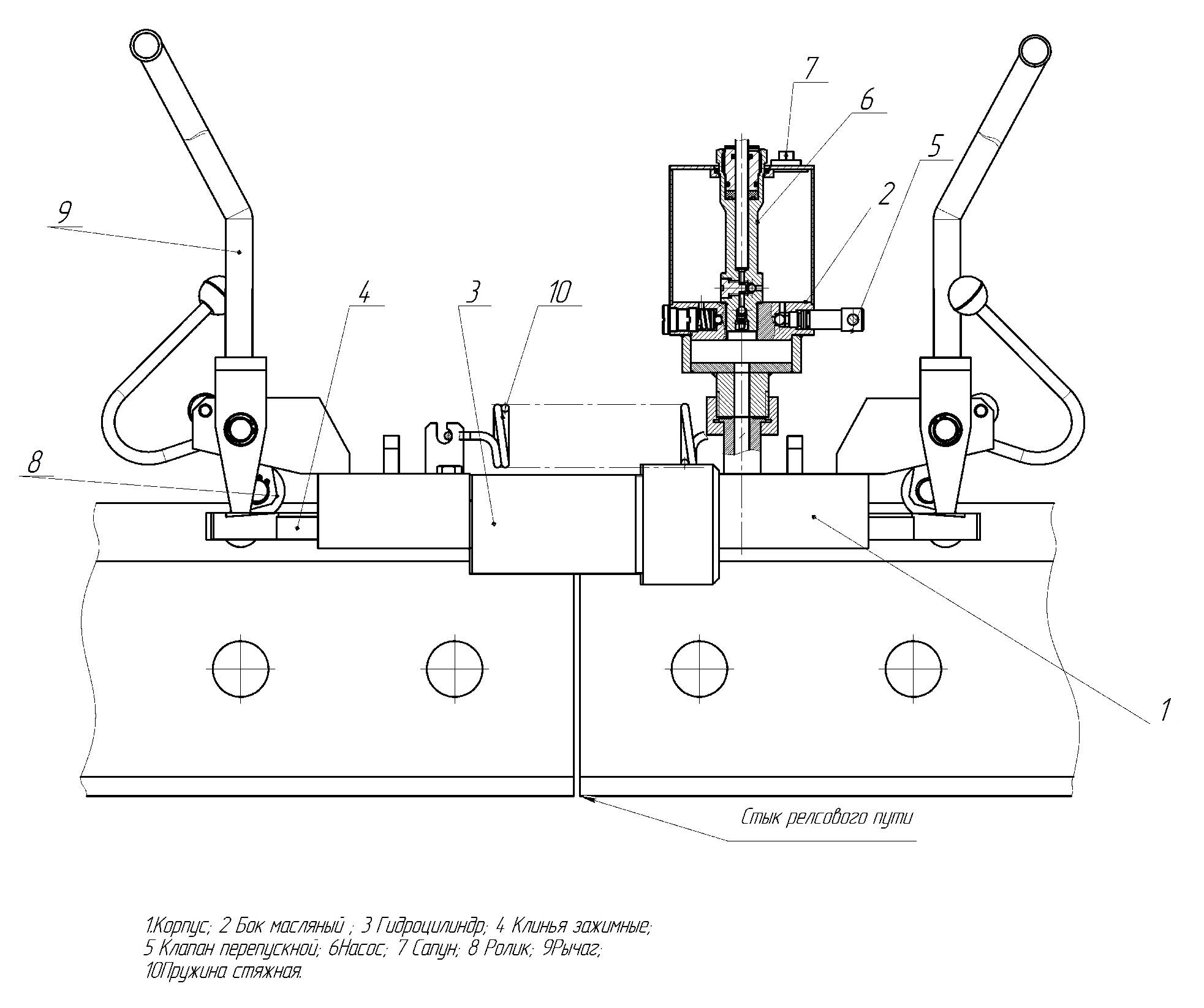 схема разгонщика гидравлического РЗ-25